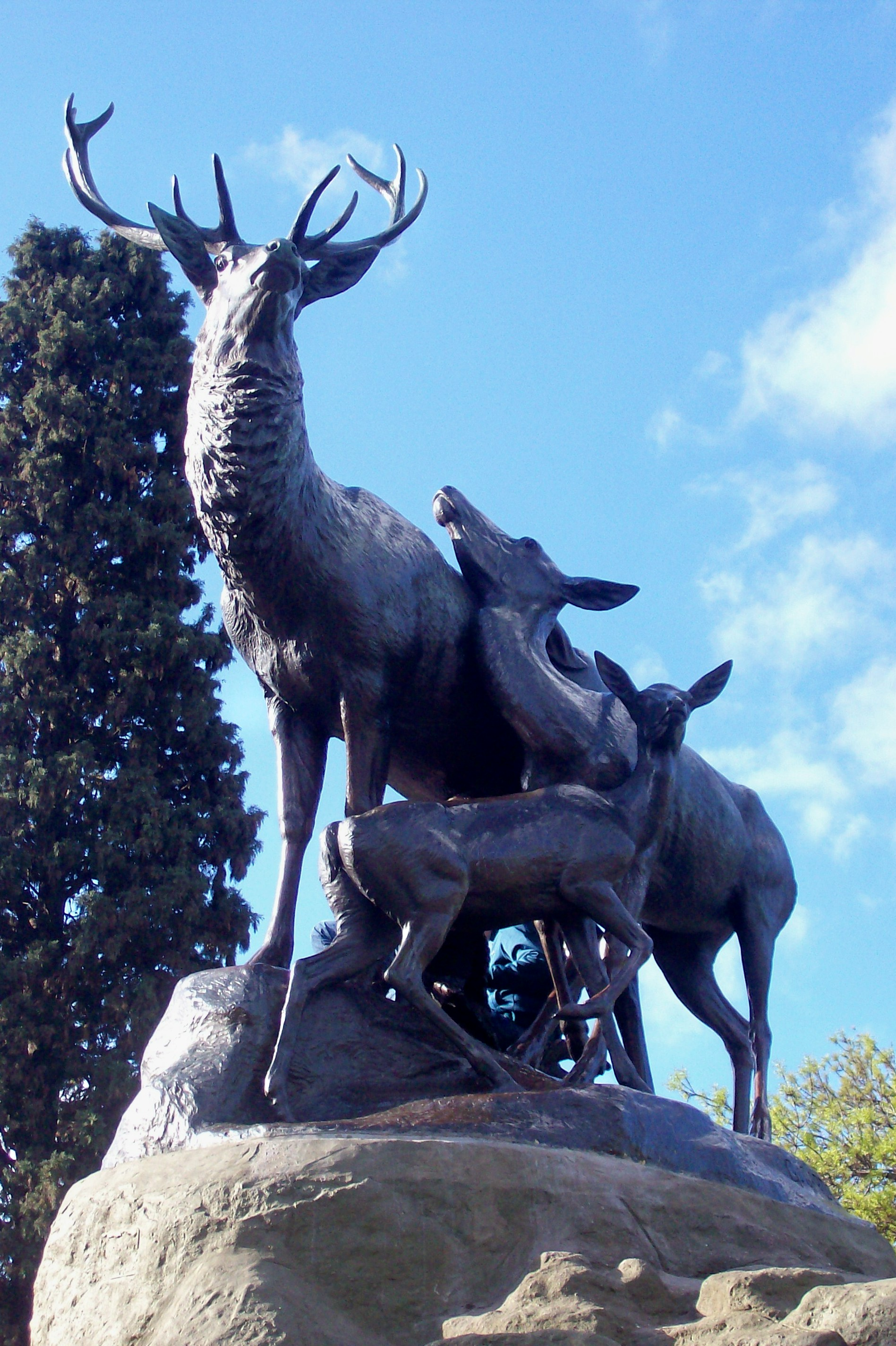 “Familia de ciervos” del escultor Georges Gardet (1863 -1939), en el barrio de Palermo, Buenos Aires, Argentina.